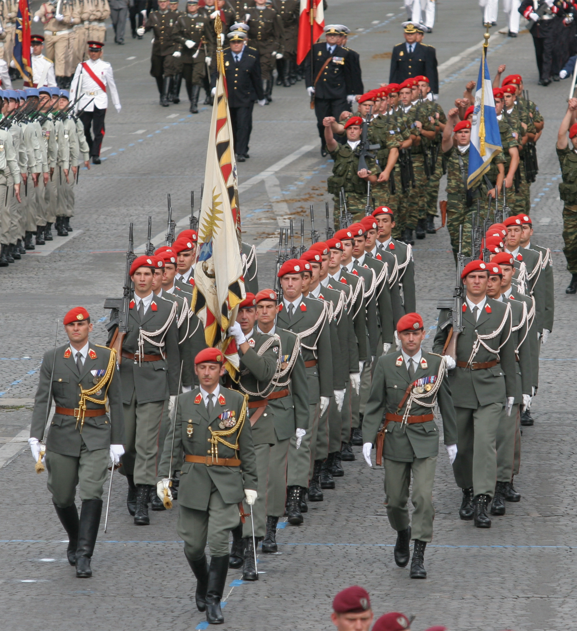 détachement du bataillon de la garde autrichienne au cours du défilé du 14 juillet 2007 sur les Champs Elysées à Paris